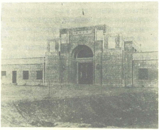 1936年的南昌站